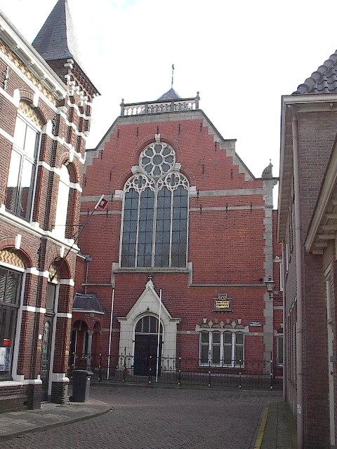 Voorgevel van de synagoge te Zwolle.